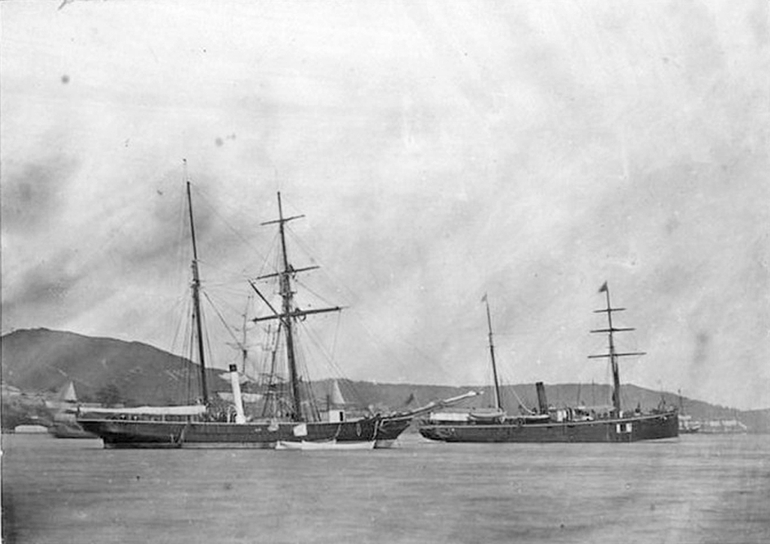 Шхуна Восток и пароход Сибирия, 1875 год